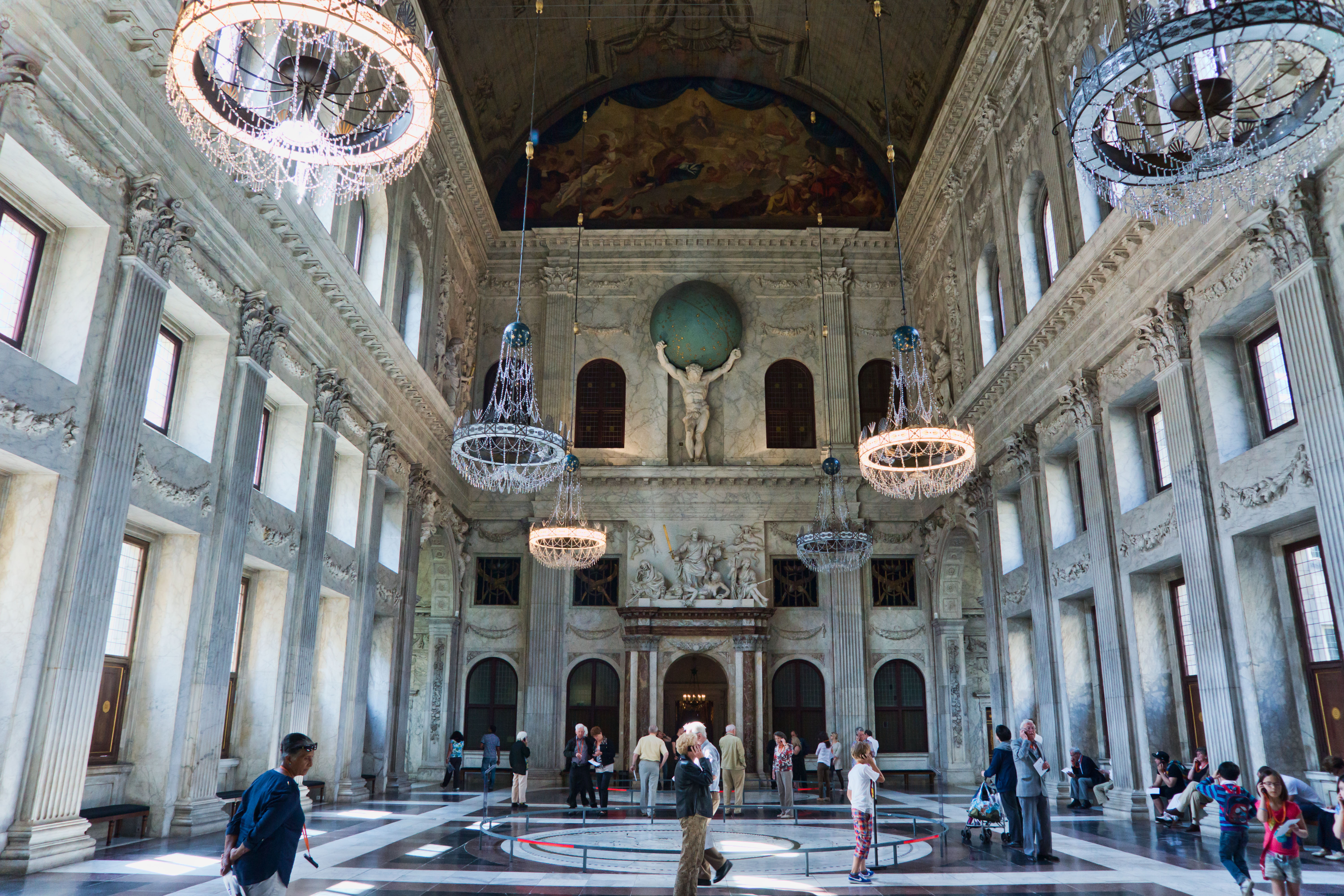 Salle principale du Palais royal d'Amsterdam